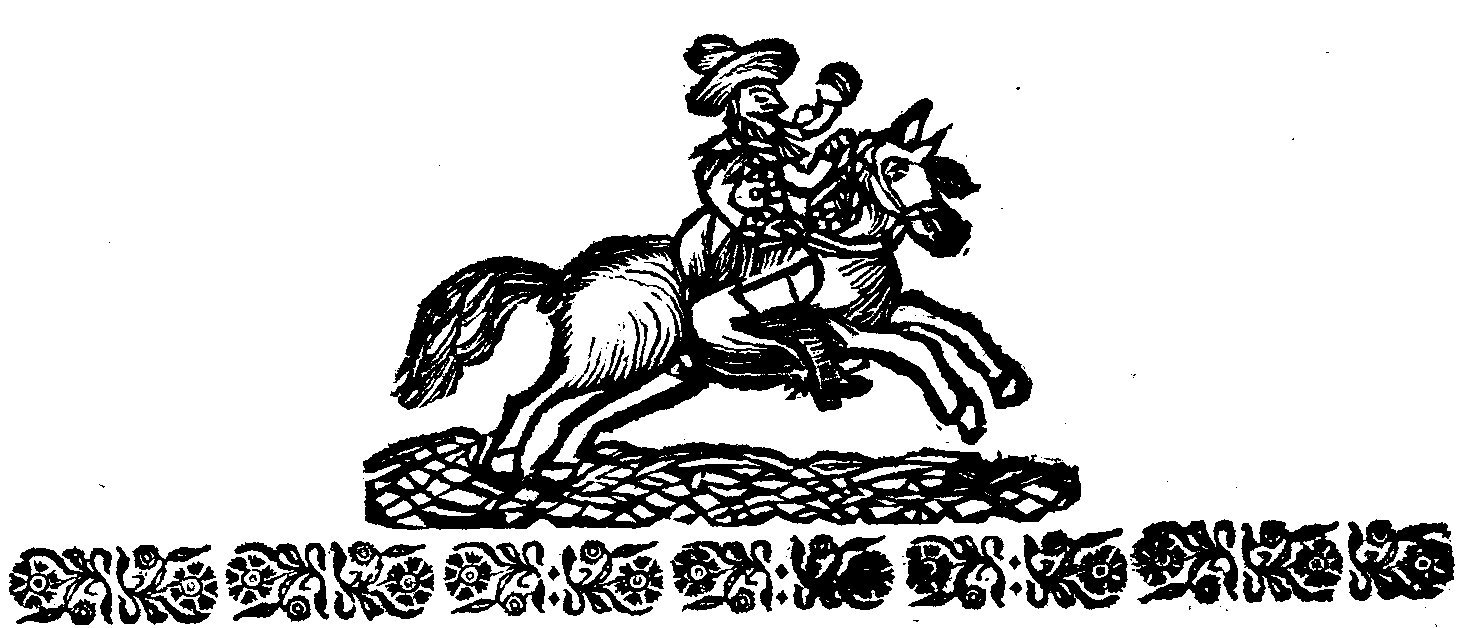 Gantz Nagel-neue Reichs-Zeitung. Im Jahr 1683.